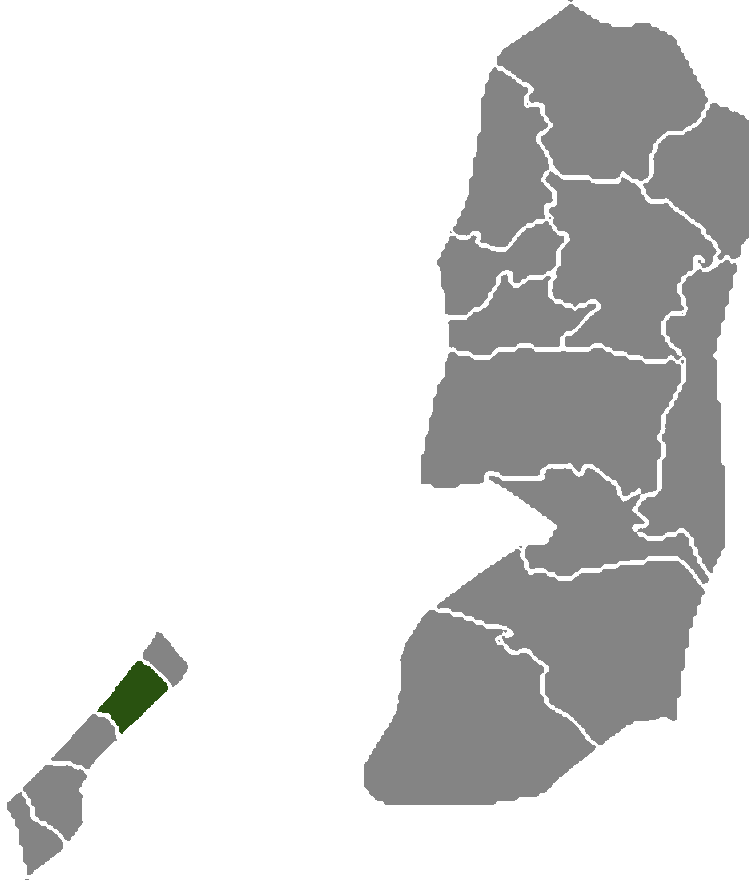 Palestine governorate Gaza.